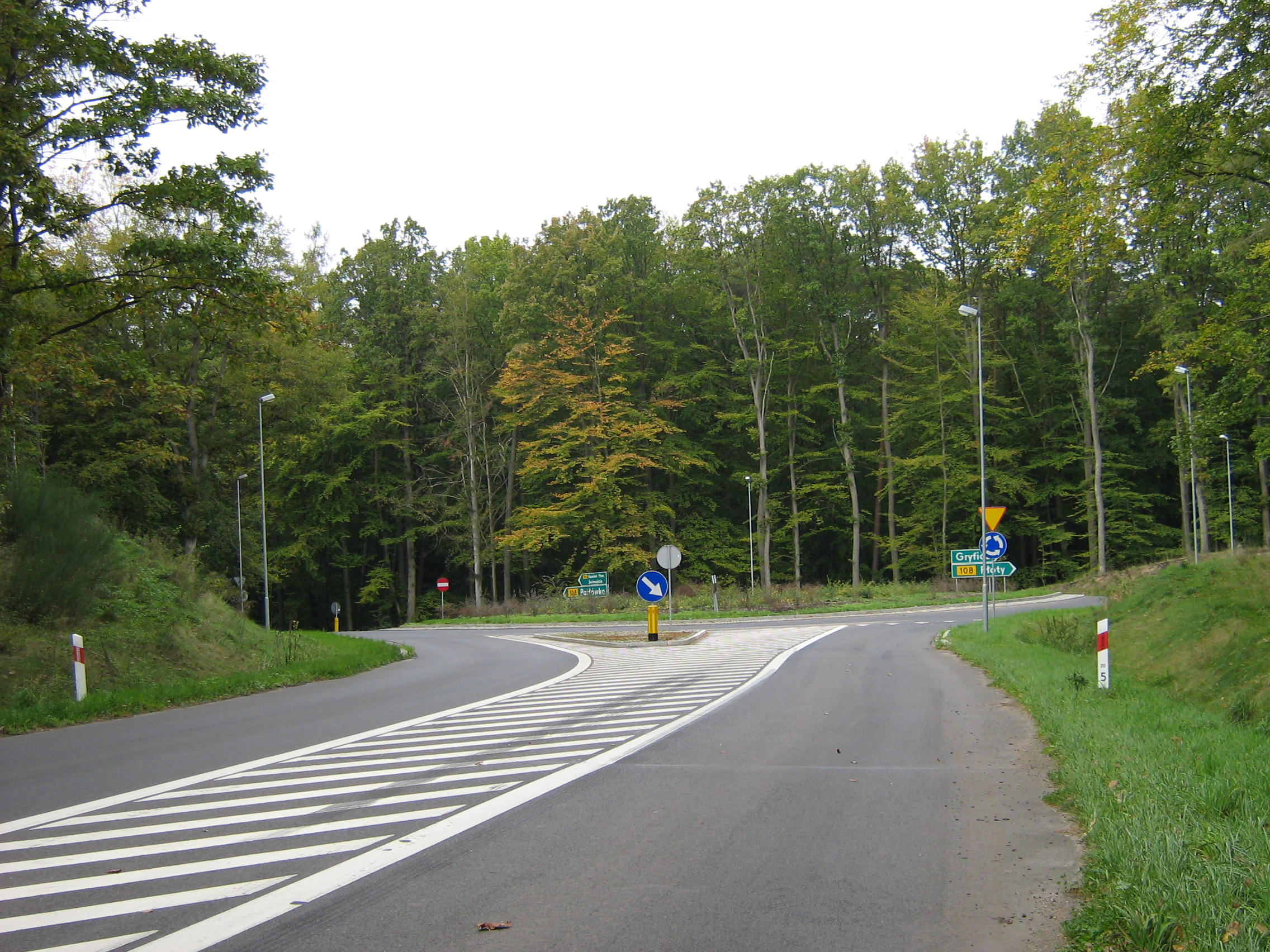 Skrzyżowanie dróg wojewódzkich 106 i 108. Widok od 106 od Nowogardu. W lewo droga do Golczewa, w prawo do płotów.